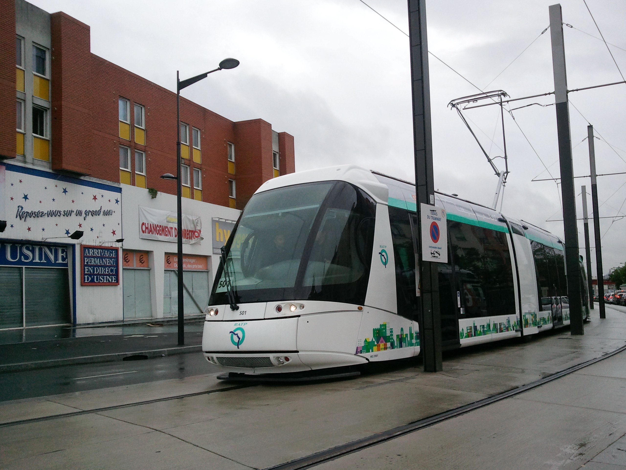 Rame Translohr n°501 du T5 en cours de test à Pierrefitte